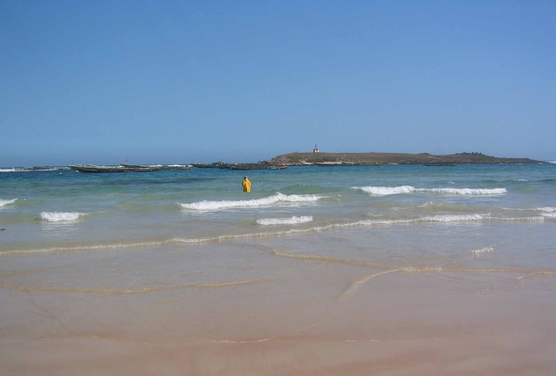 L'île de Yoff, toute proche du village de Yoff, près de Dakar (Sénégal)